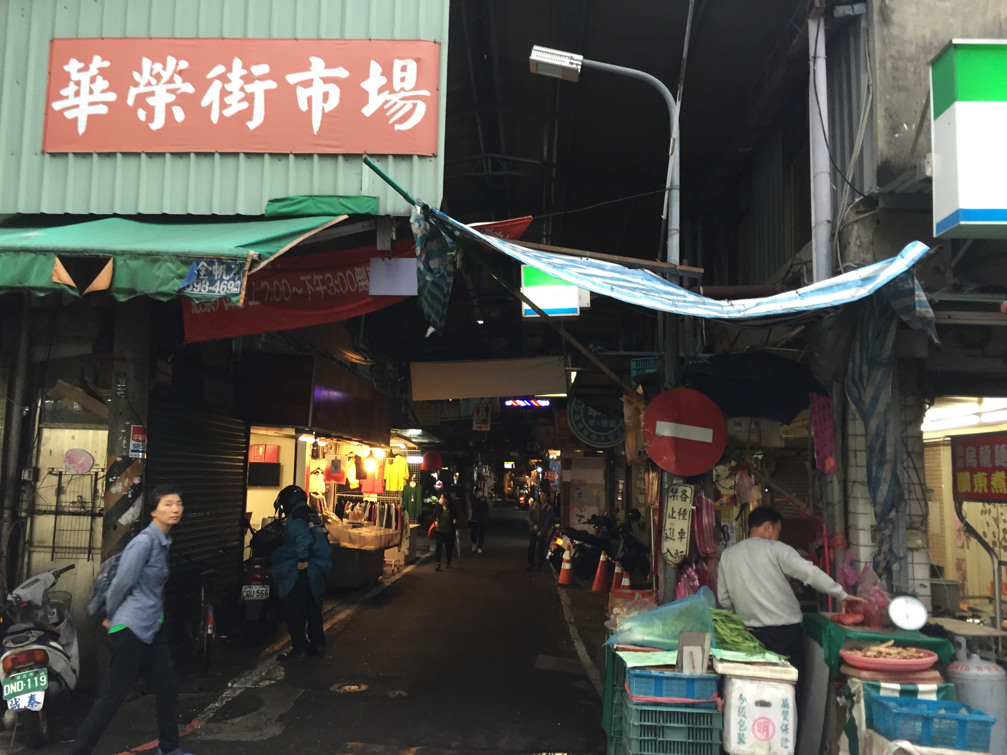 台灣台北市士林區華榮街市場北口